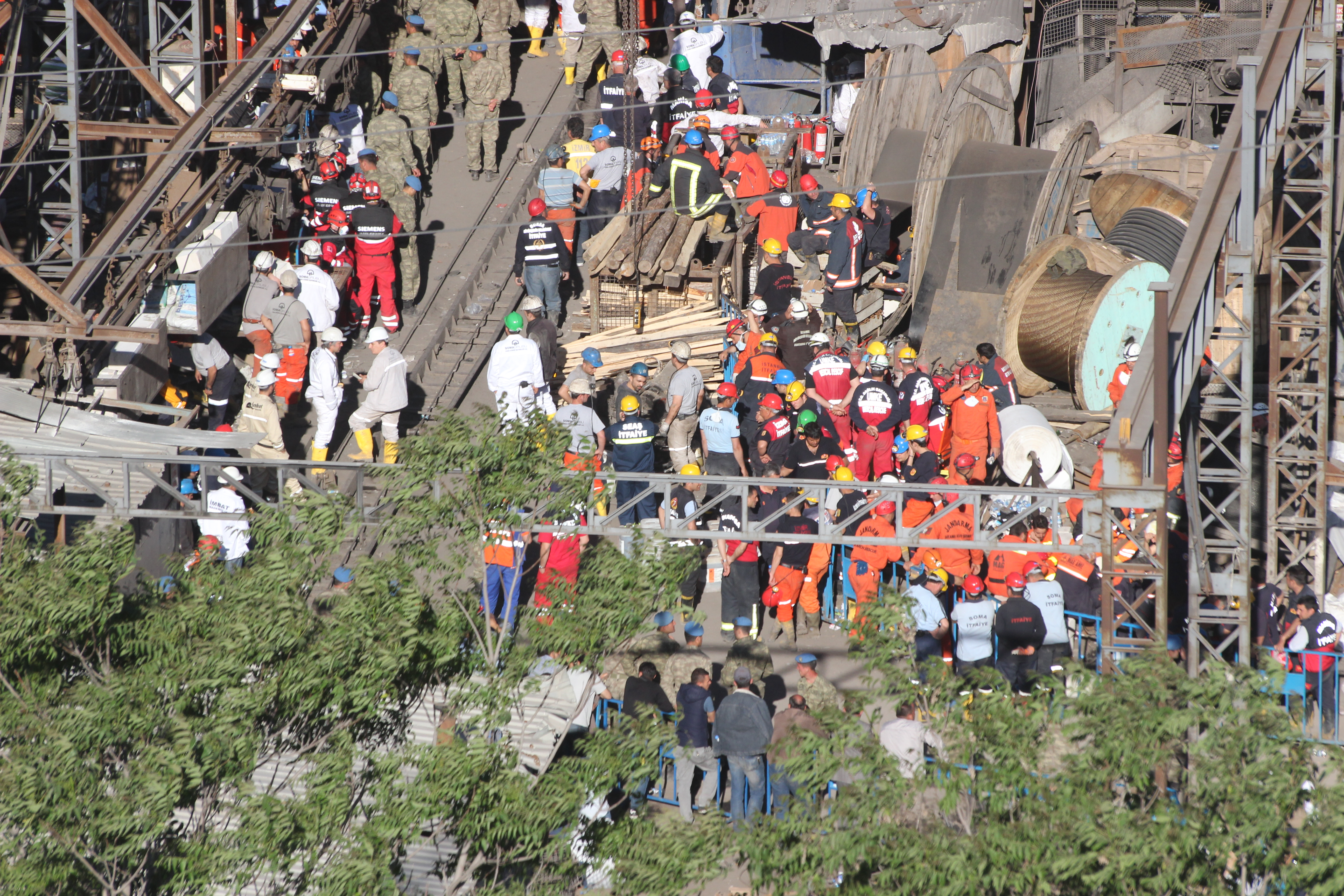 Soma faciası sonrası maden giriş kapısı